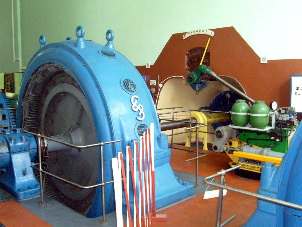 Jeden z generatorów elektrowni w Gródku, woj. kujawsko-pomorskie, pow. świecki.